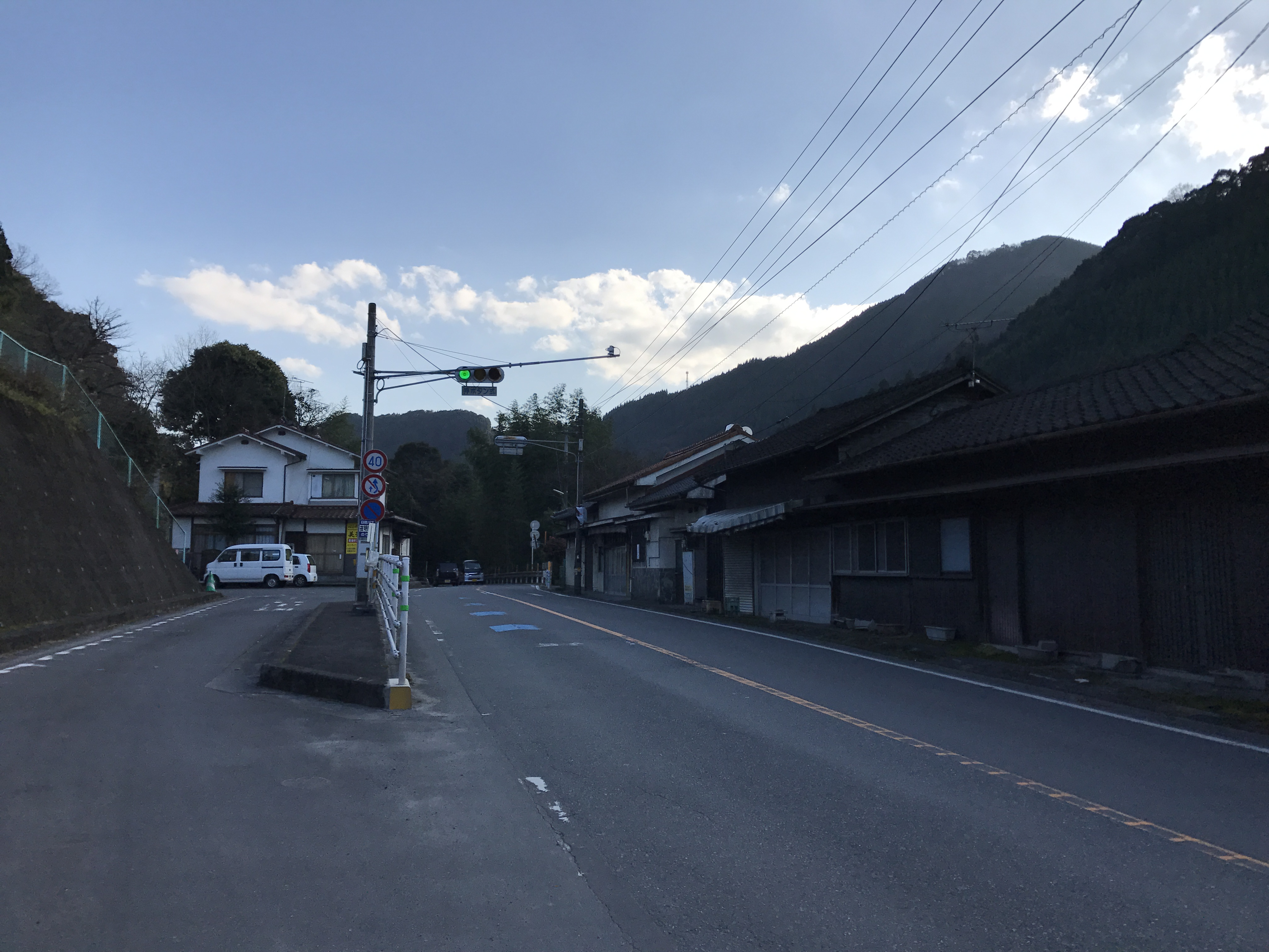 夜明駅付近の国道386号